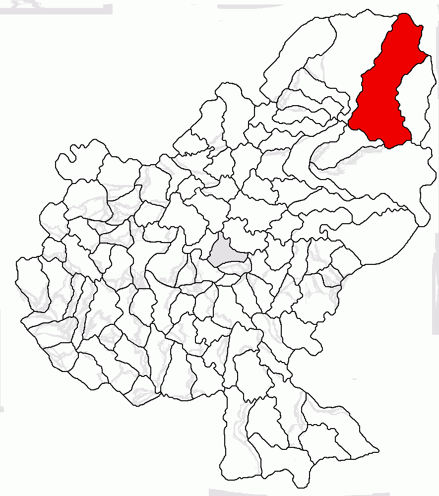 Categorie:Hărţi ale judeţului Mureş